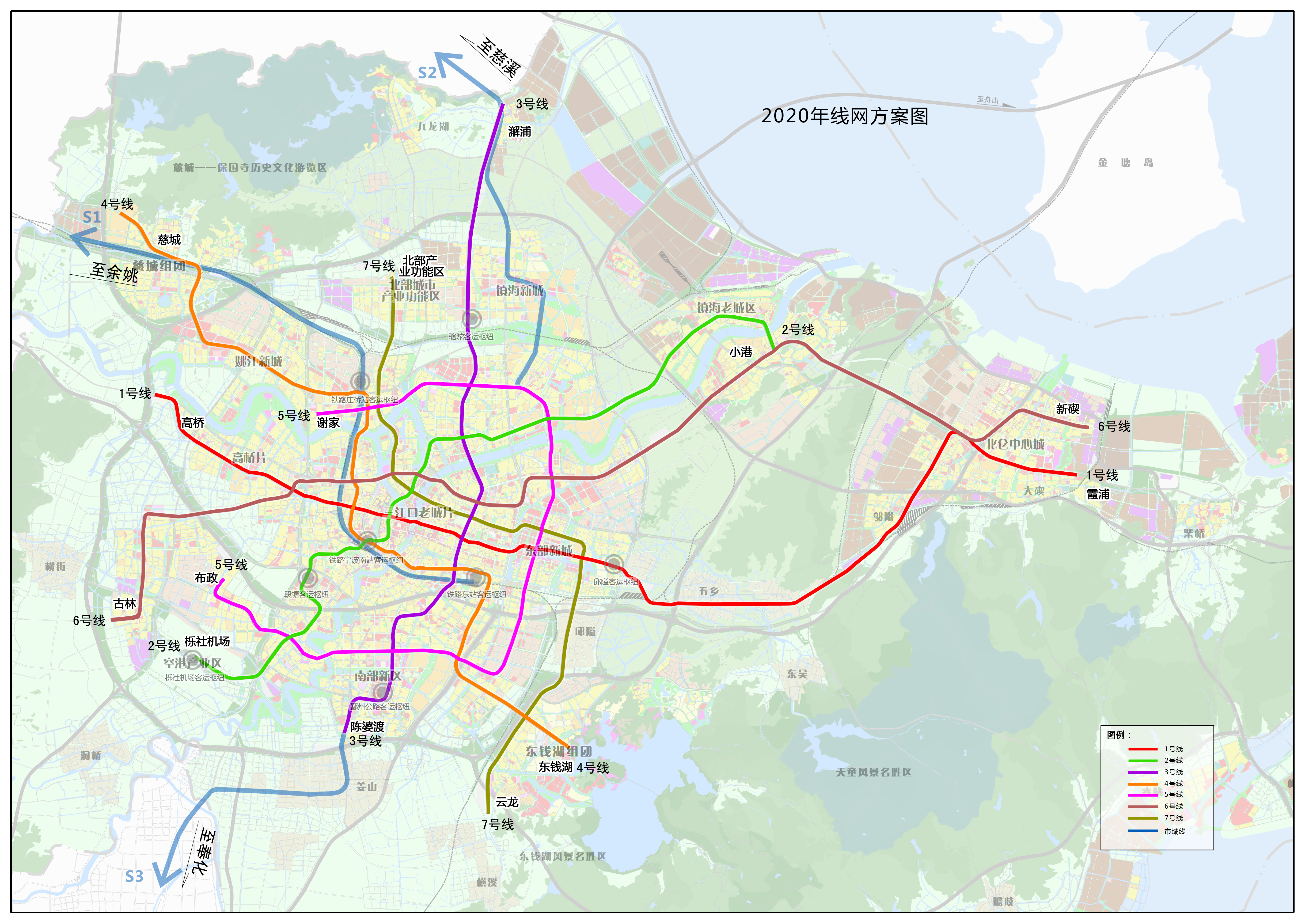 宁波市城市轨道交通线网规划（2015年修编） - 2020年线网方案图